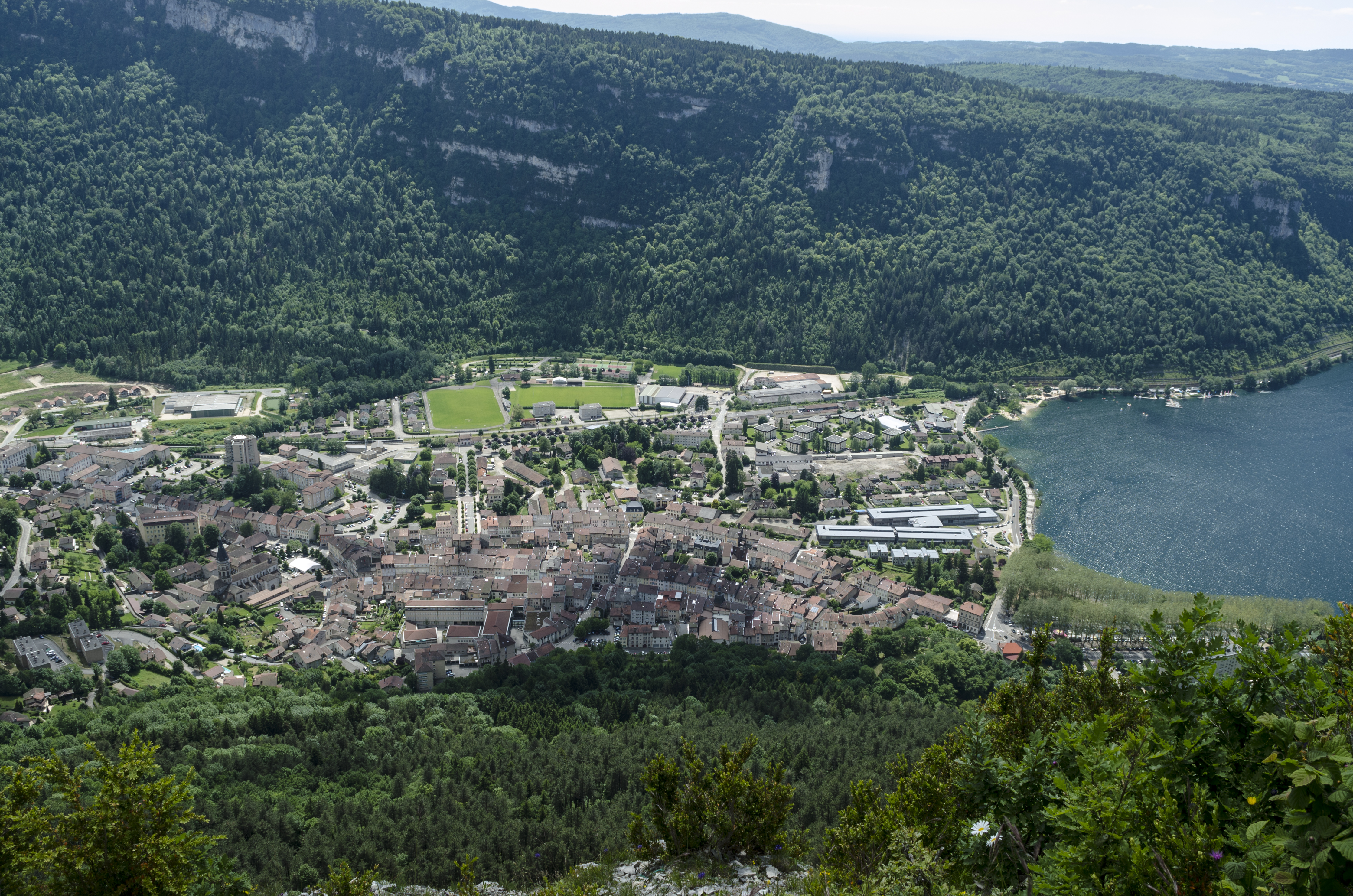 Ville de Nautua vue du haut des falaises